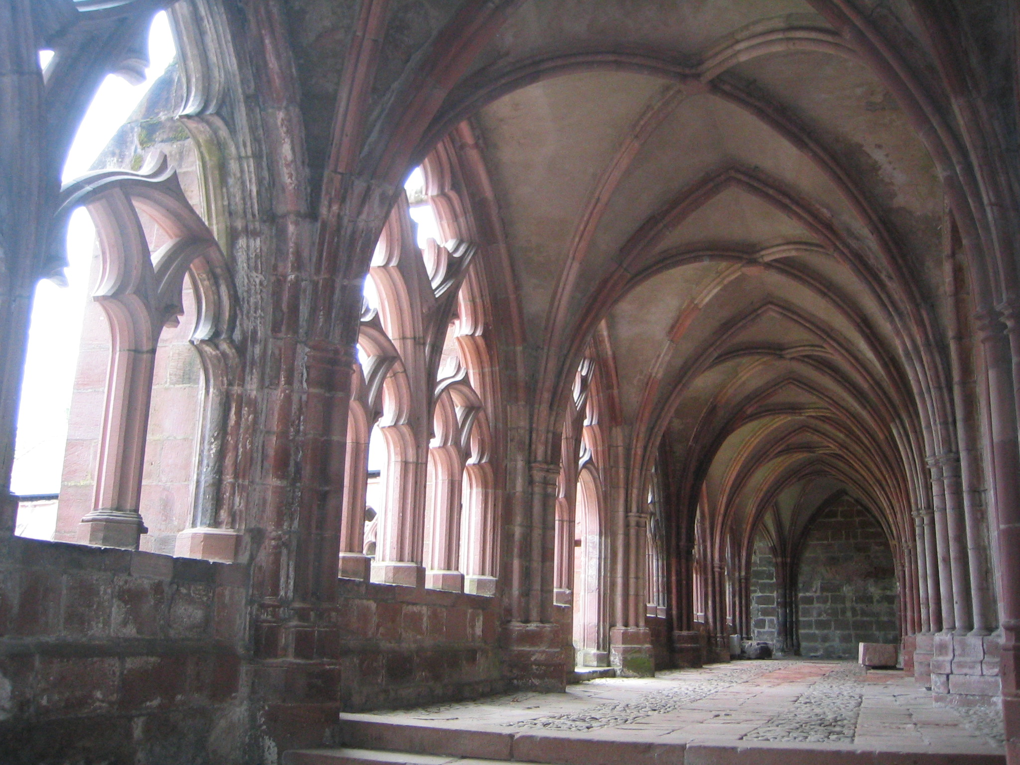 Cloître gothique de Saint-Dié-des-Vosges (la galerie Sud)